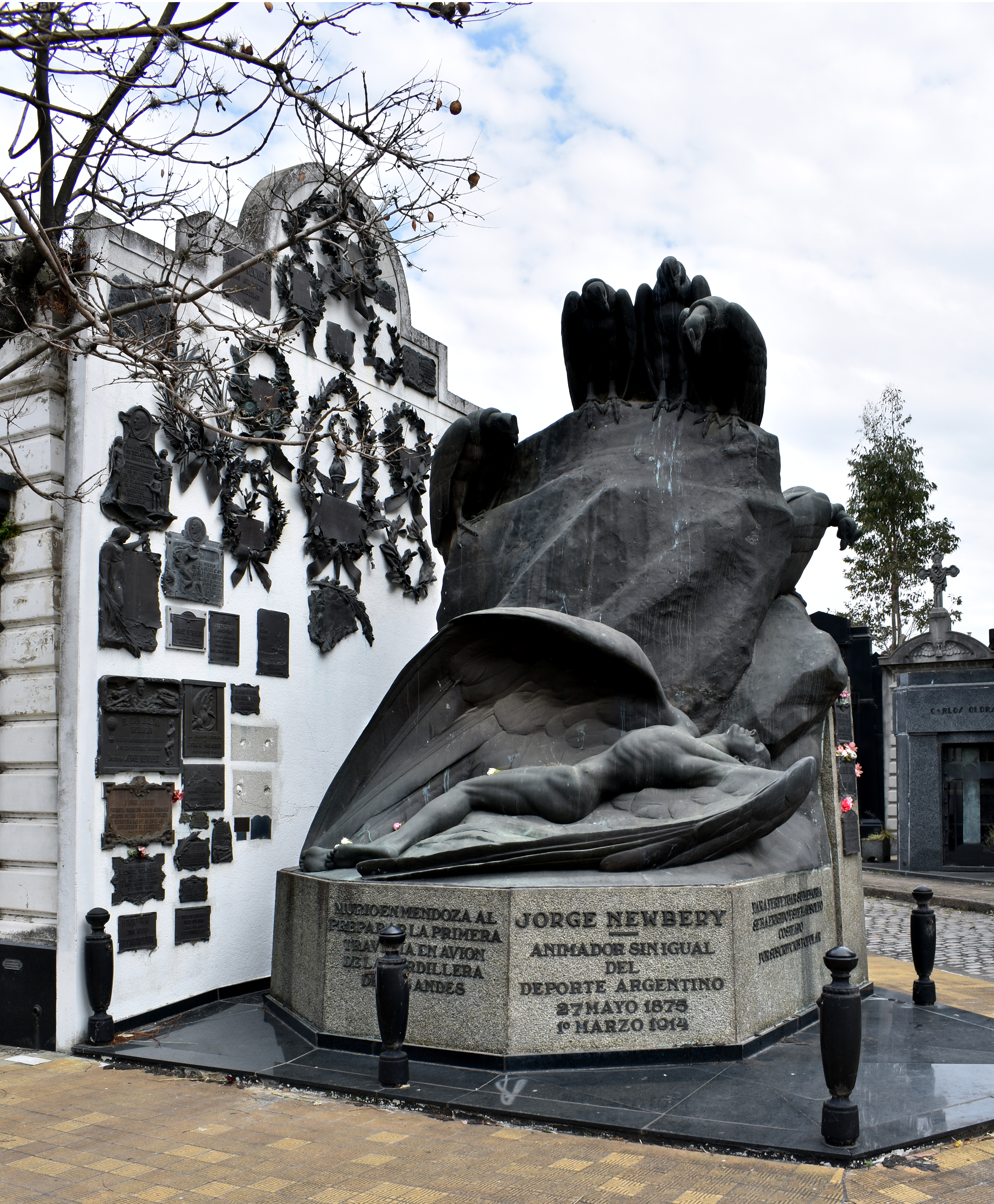 mausoleum and funerary sculpture